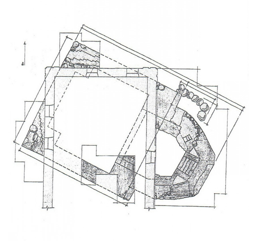 Віцебск. Абмерны план падмурка Стрэчанская царквы